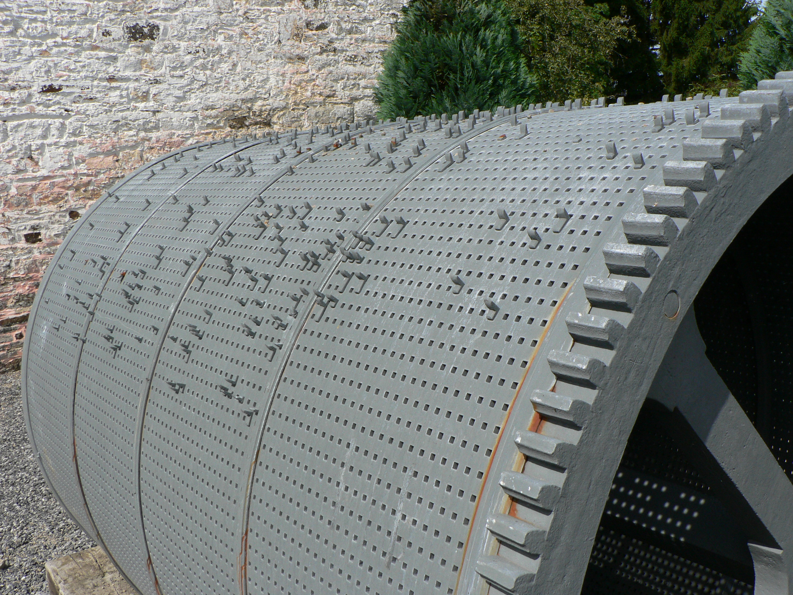 Carillon drum, Musée de la cloche et du carillon, Tellin